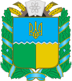 Герб Поліського району